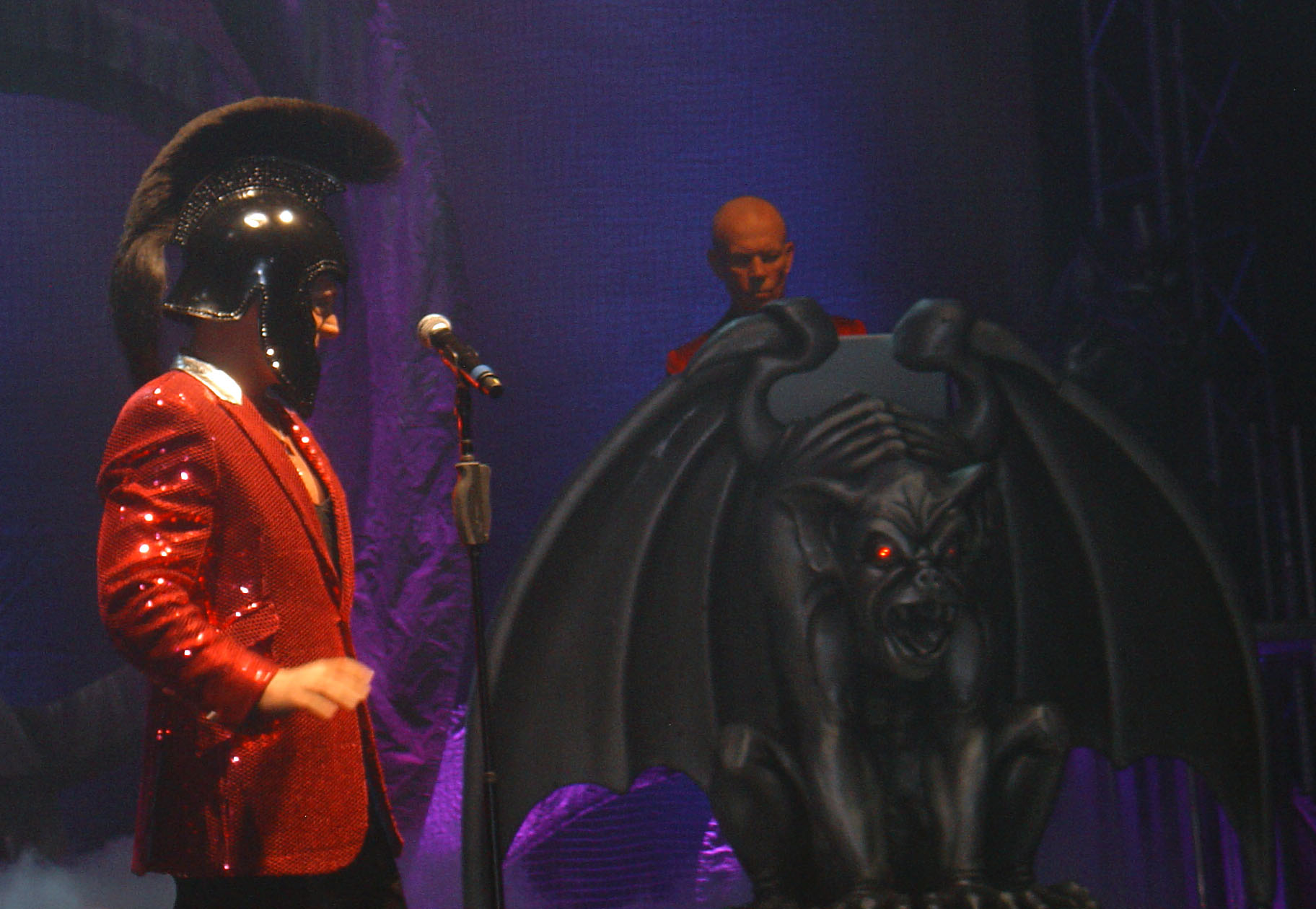 Erasure Konzert 2011 im Alten Schlachthof in Dresden